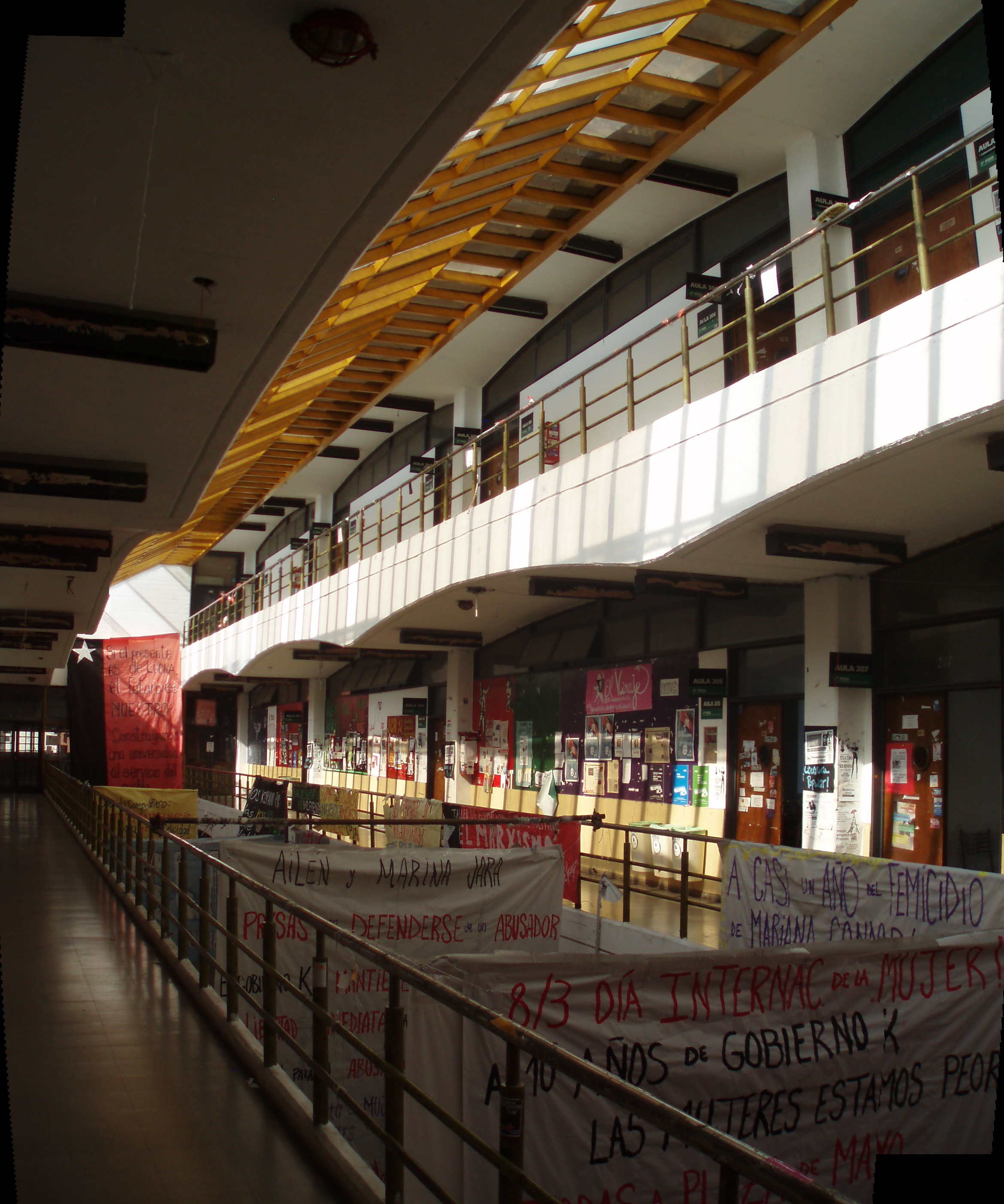 Pasillo interior del Edificio Tres Facultades de la Universidad de La Plata.